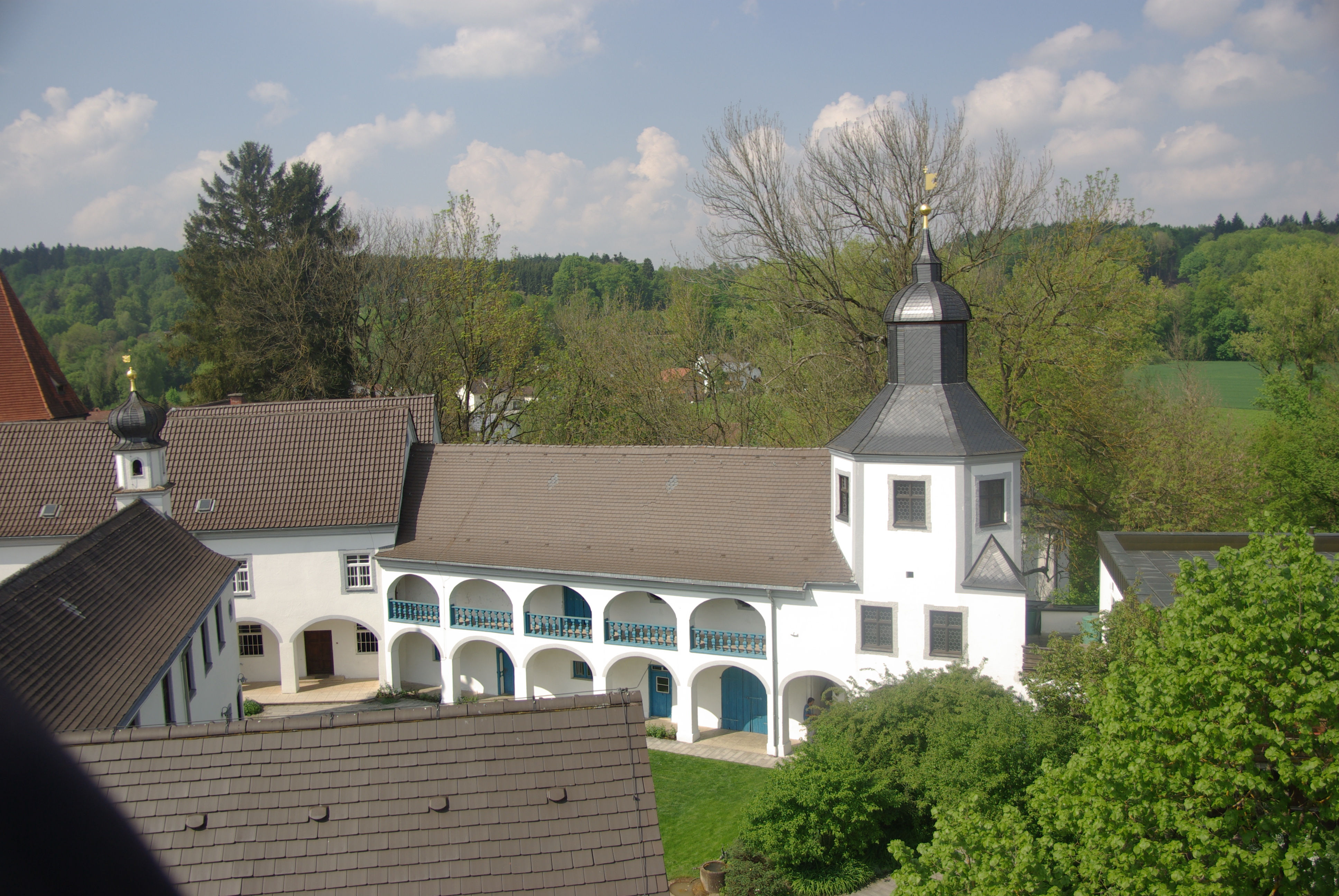 Der alte Pfarrhof von obenThis is a photograph of an architectural monument.